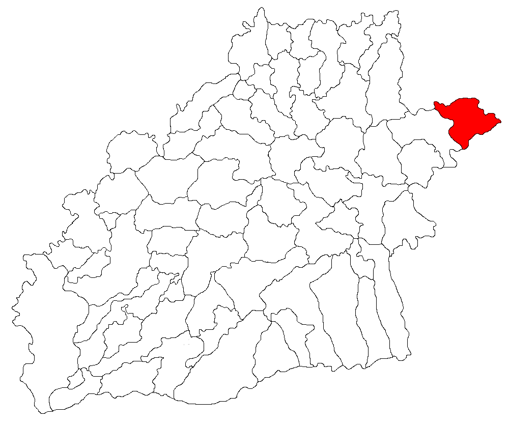 Categorie:Hărţi ale judeţului Sibiu